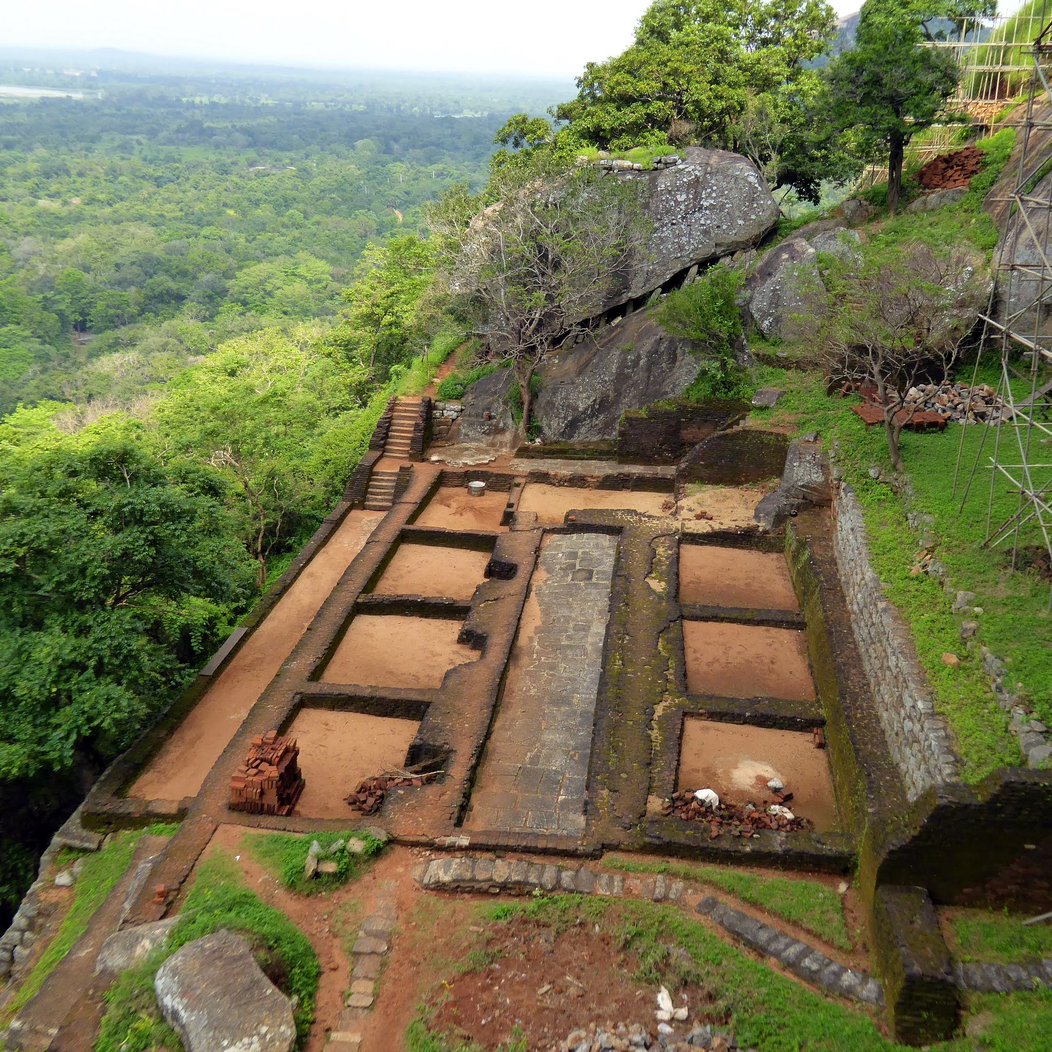 Sigiriya, Sri Lanka